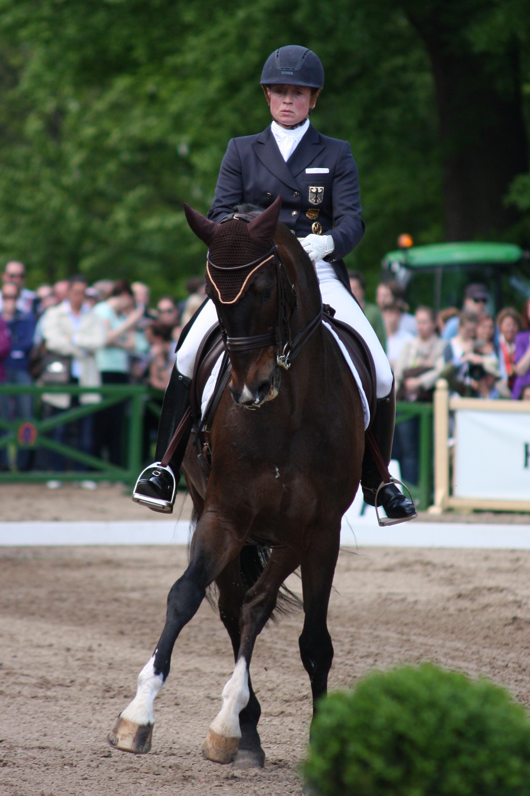 77. Internationales Pfingstturnier Wiesbaden 2013, CDI **** Dressurprüfung Grand Prix de Dressage, Werth, Isabell mit Der Stern OLD Personality rights warning Although this work is freely licensed or in the public domain, the person(s) shown may have rights that legally restrict certain re-uses unless those depicted consent to such uses. In these cases, a model release or other evidence of consent could protect you from infringement claims.